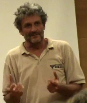 Tomo Križnar